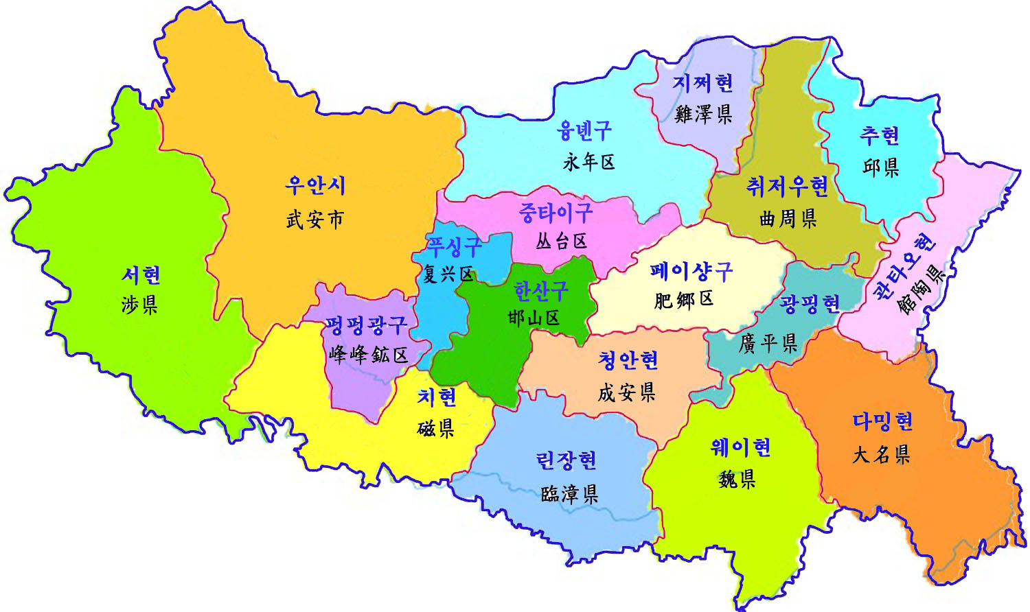 허베이성 한단시 행정구역